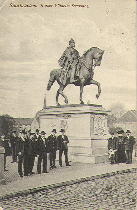 Kaiser Wilhelm I.-Reiterstandbild Saarbrücken